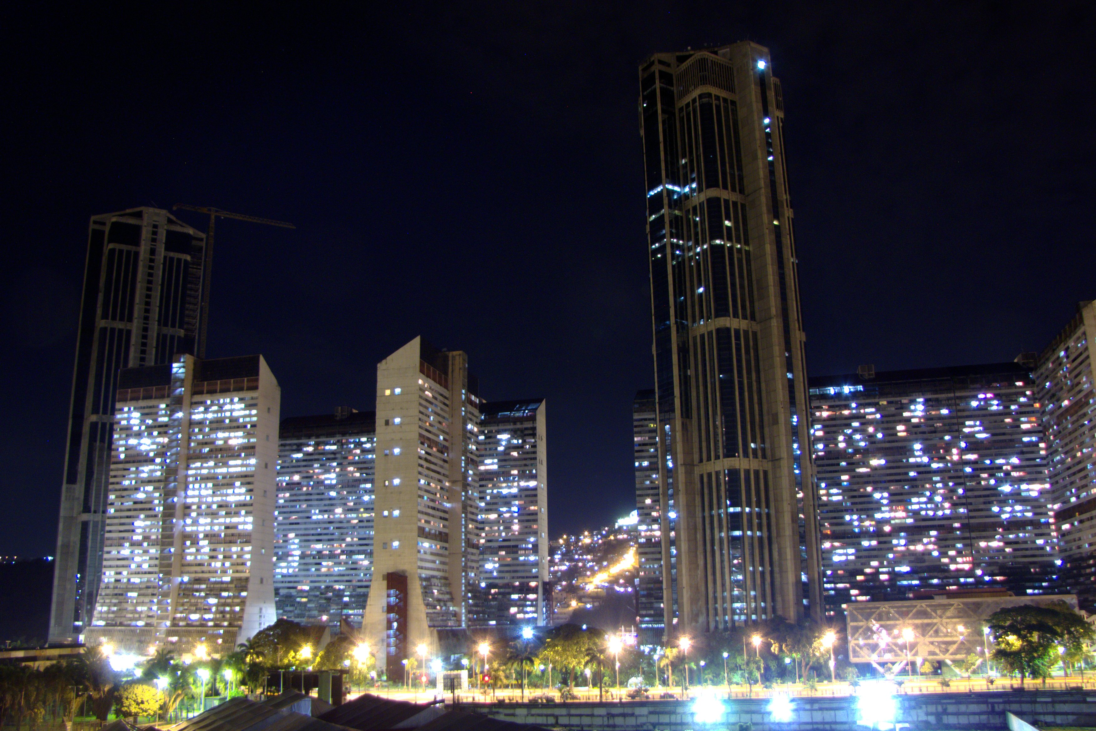 parque central torres mas altas del país Caracas, Venezuela.